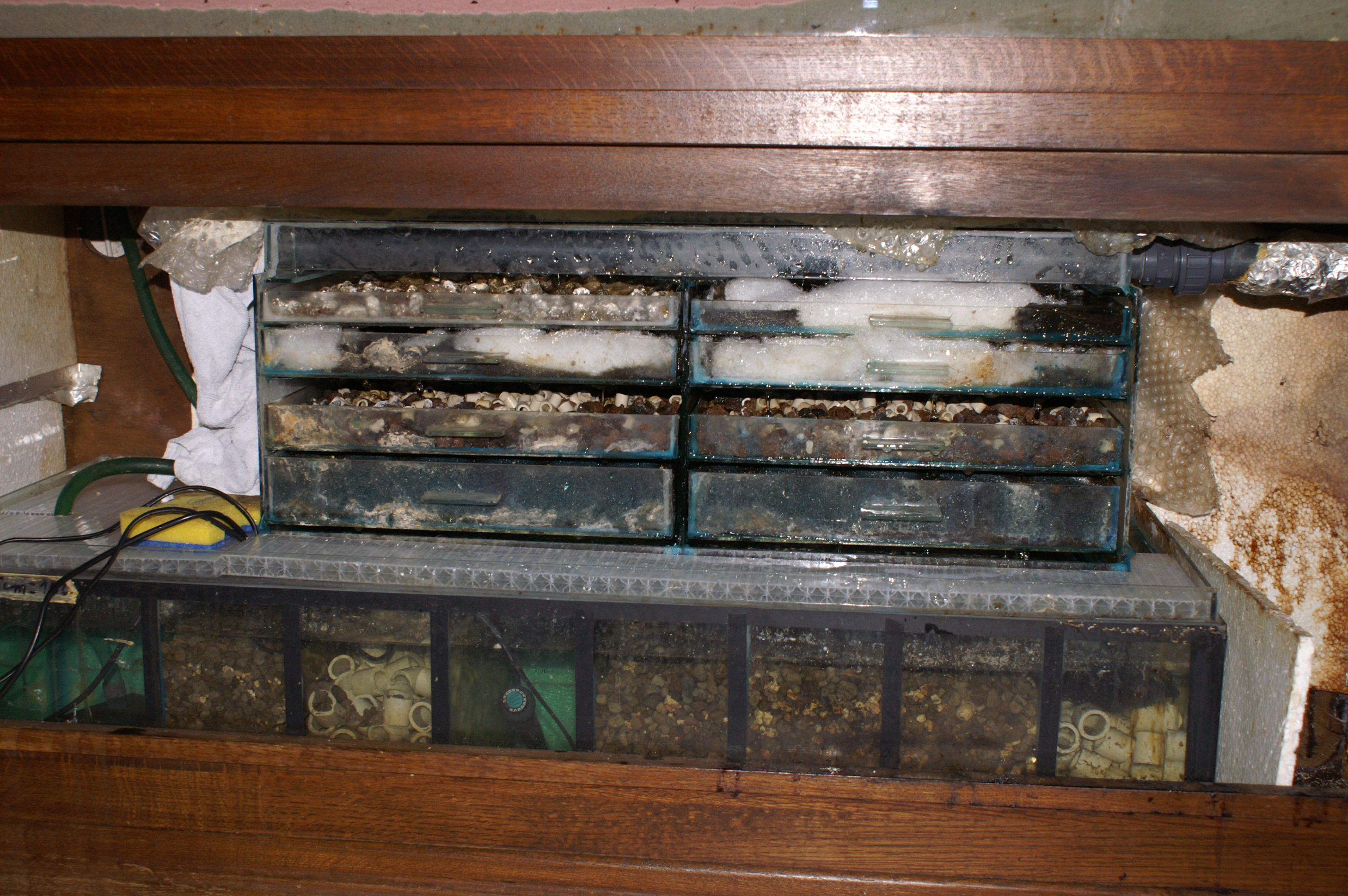 Description Biologische buitenfilter. Het bovenste gedeelte is een droogfilter.Date 26 January 2007Source Own workAuthor Discus Biologische buitenfilter. Het bovenste gedeelte is een droogfilter.